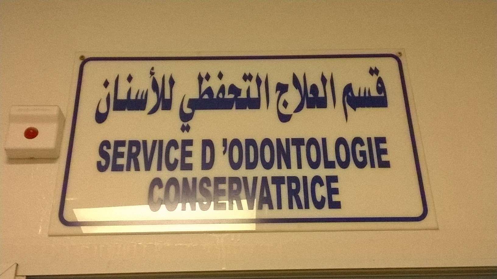 Clinique de médecine dentaire de Monastir, Monastir, Tunisie المصحة الاستشفائية الجامعية لطب الأسنان بالمنستير, المنستير، تونس